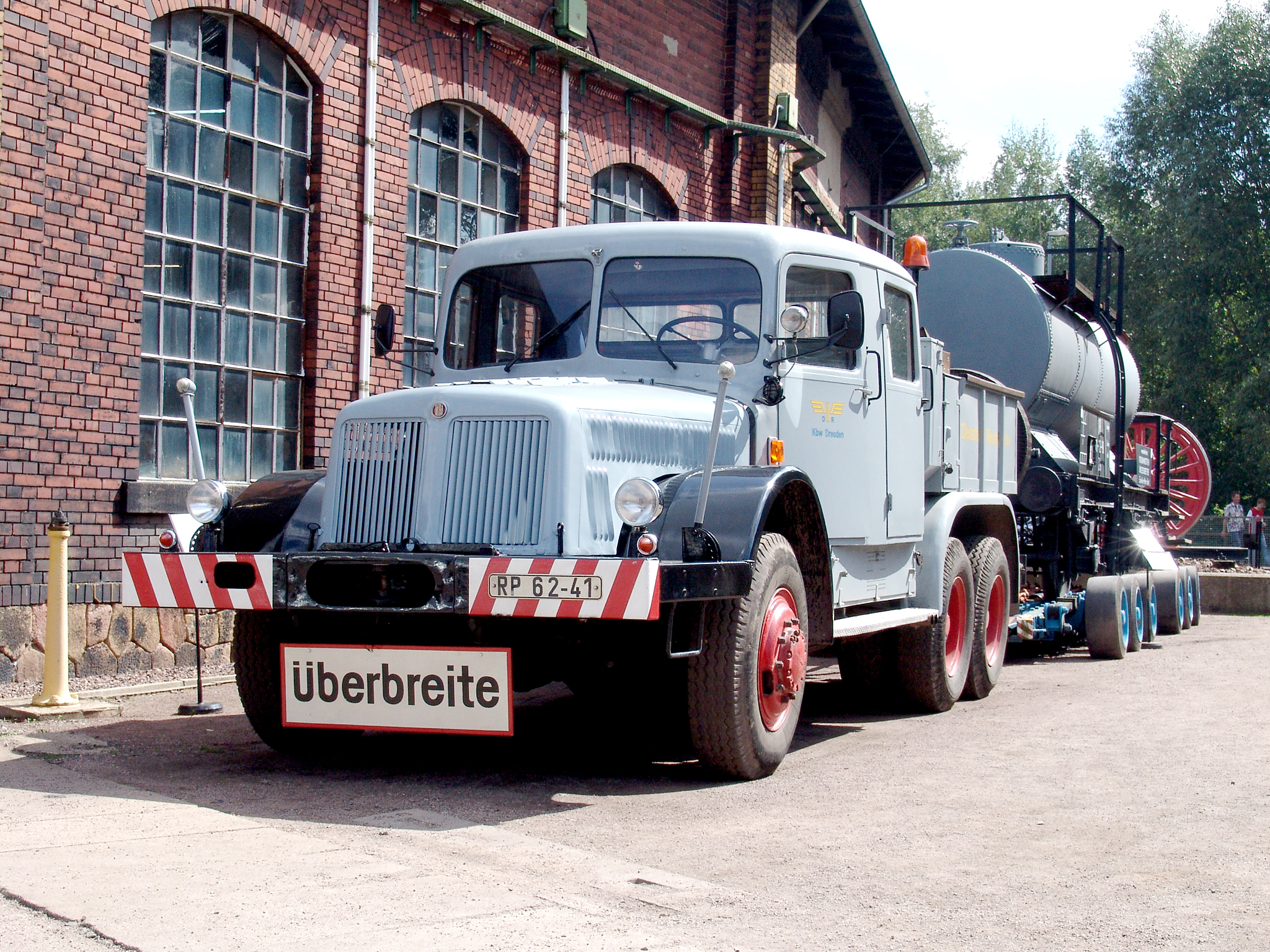 Schwerlastzugmaschine Tatra T 141 mit Culemeyer-Straßenroller beladen mit einem Privatkesselwagen für den Transport von Essigsäure.